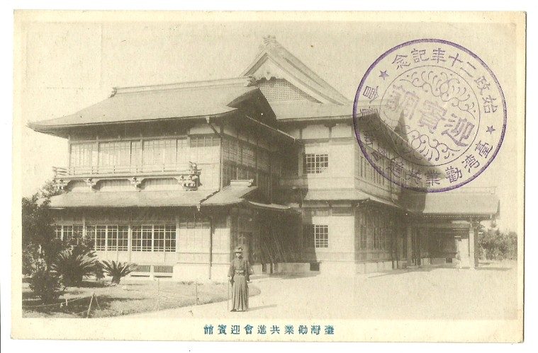 中文（台灣）: 1916年日本政府慶祝始政二十週年紀念，於臺北舉行臺灣勸業共進會，會場計有大致完工的臺灣總督府(實際完工為1919年)、新公園台灣博物館（1915年完工）、植物園的物產陳列館（今植物園國立歷史博物館址）